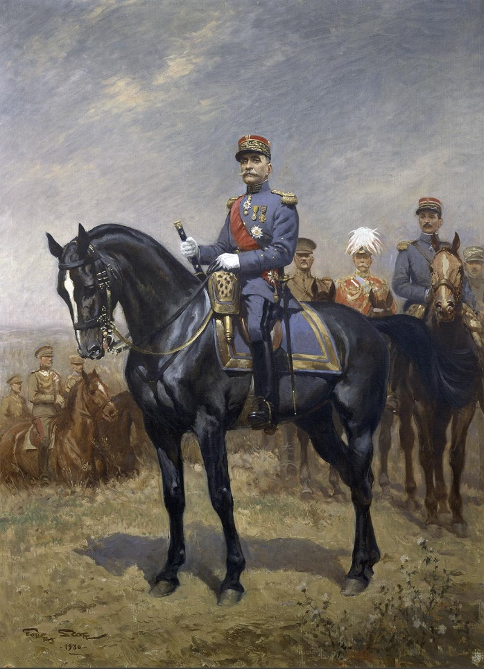 Peinture de Georges Scott « Le maréchal Foch et les Alliés ».